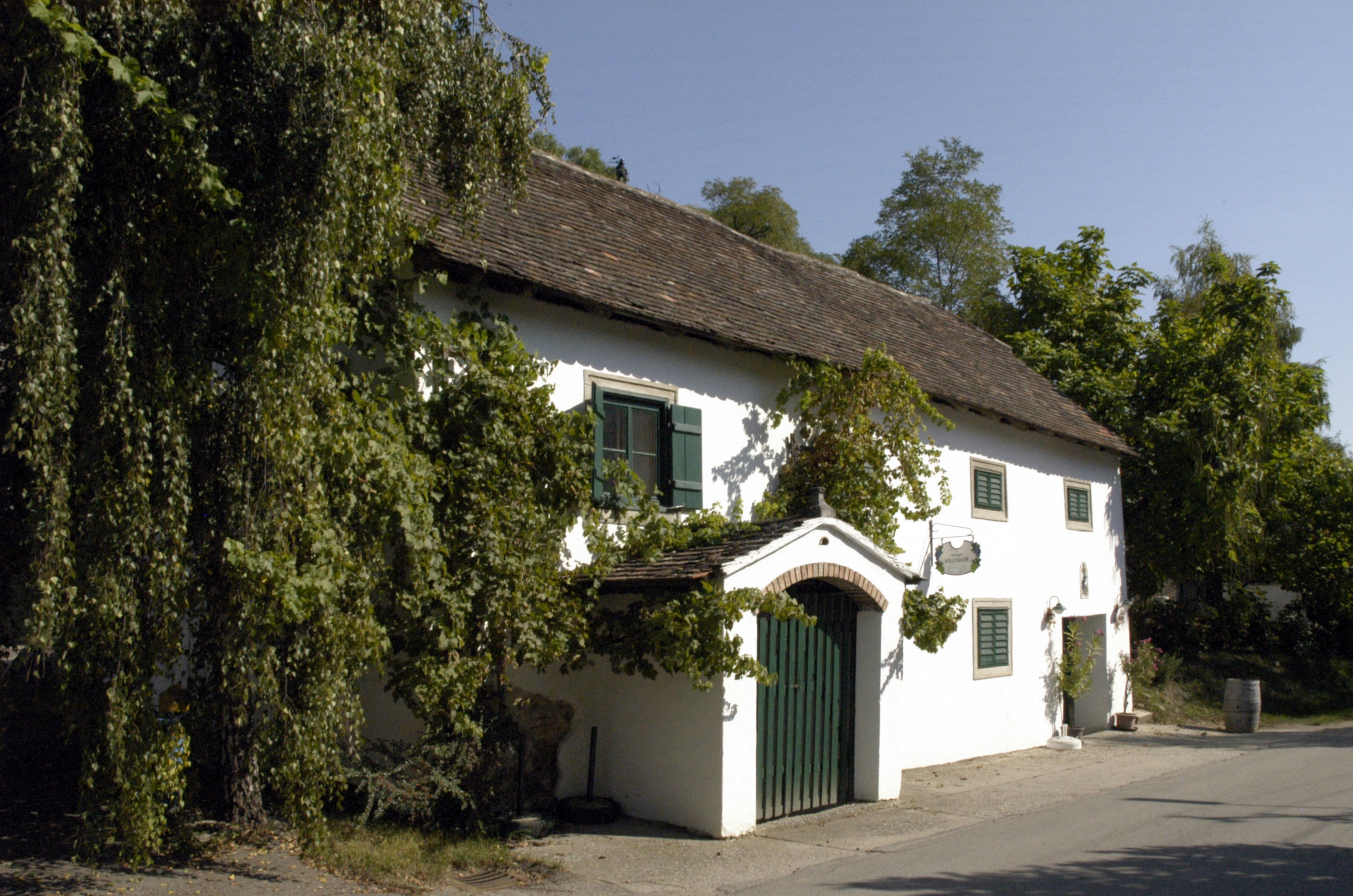 Presshaus, Weinkeller Himmelbauer in Untermarkersdorf, Gemeinde Hadres